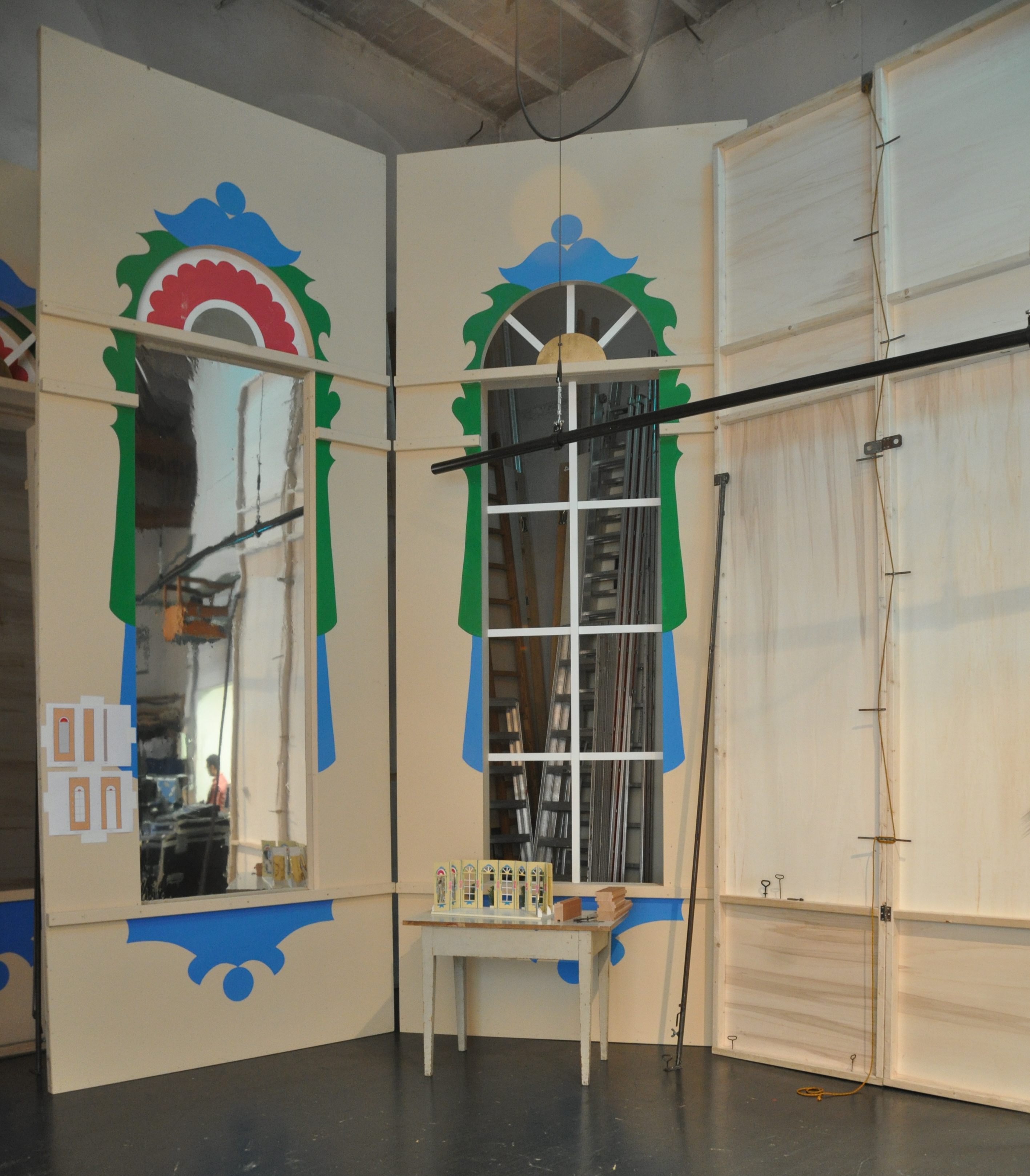 Konzerthaus Ravensburg, Kulissen des Rutentheaters 2012